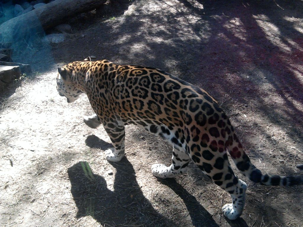 Ejemplar en la "Jungla Maya" de Buin Zoo